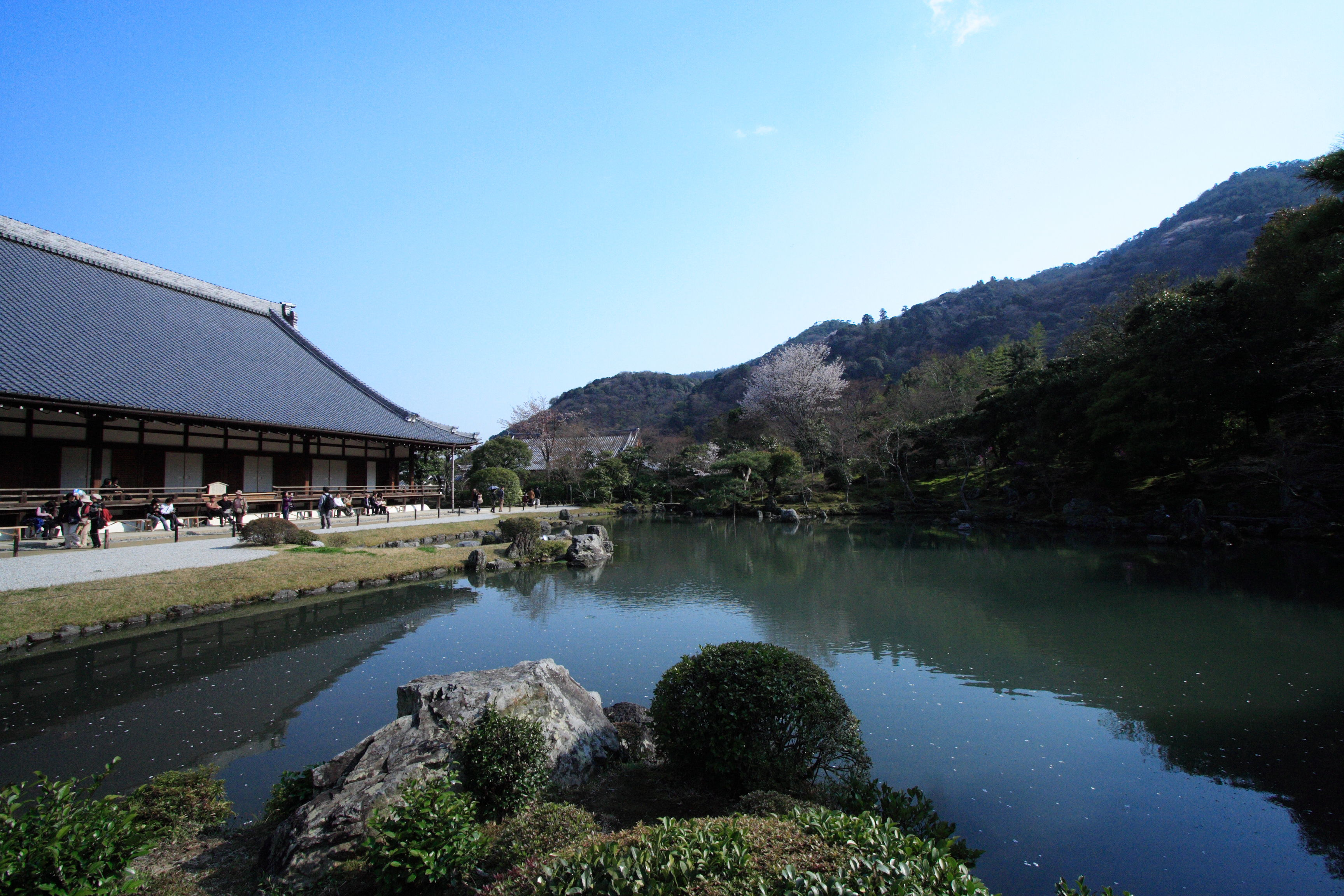 天龍寺庭園 京都市/Japanese garden in Tenryūji Kyoto,Japan